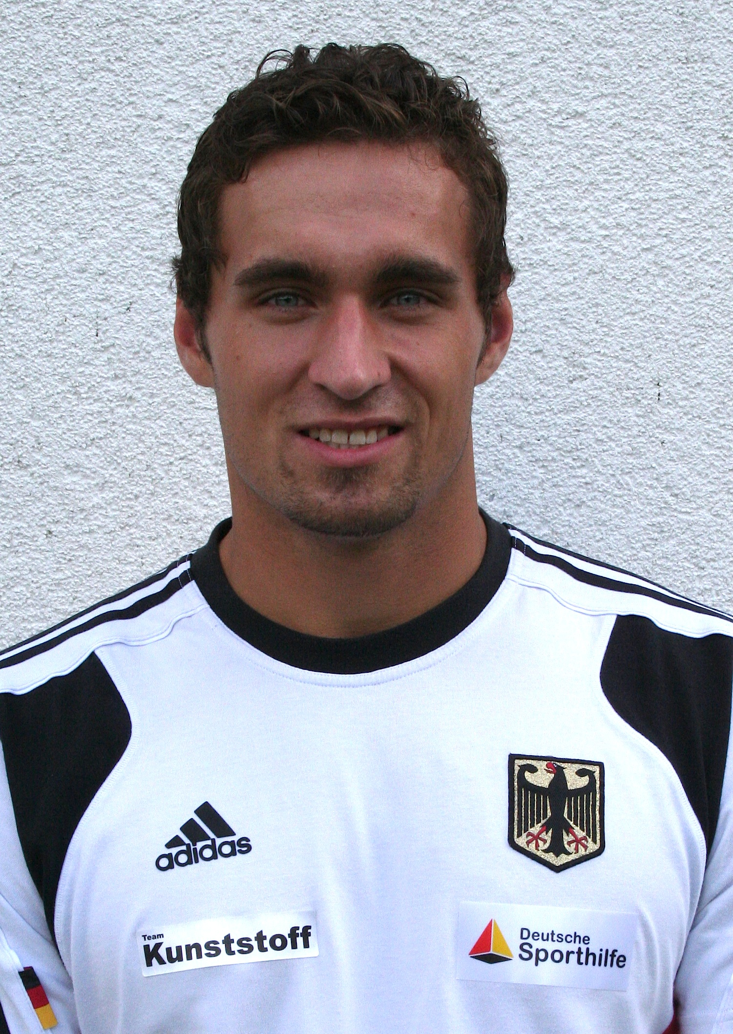 Weltmeister im Vierer-Kajak über 1.000m im Jahr 2011